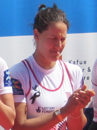 Jessica Eddie, Ruder-EM 2016